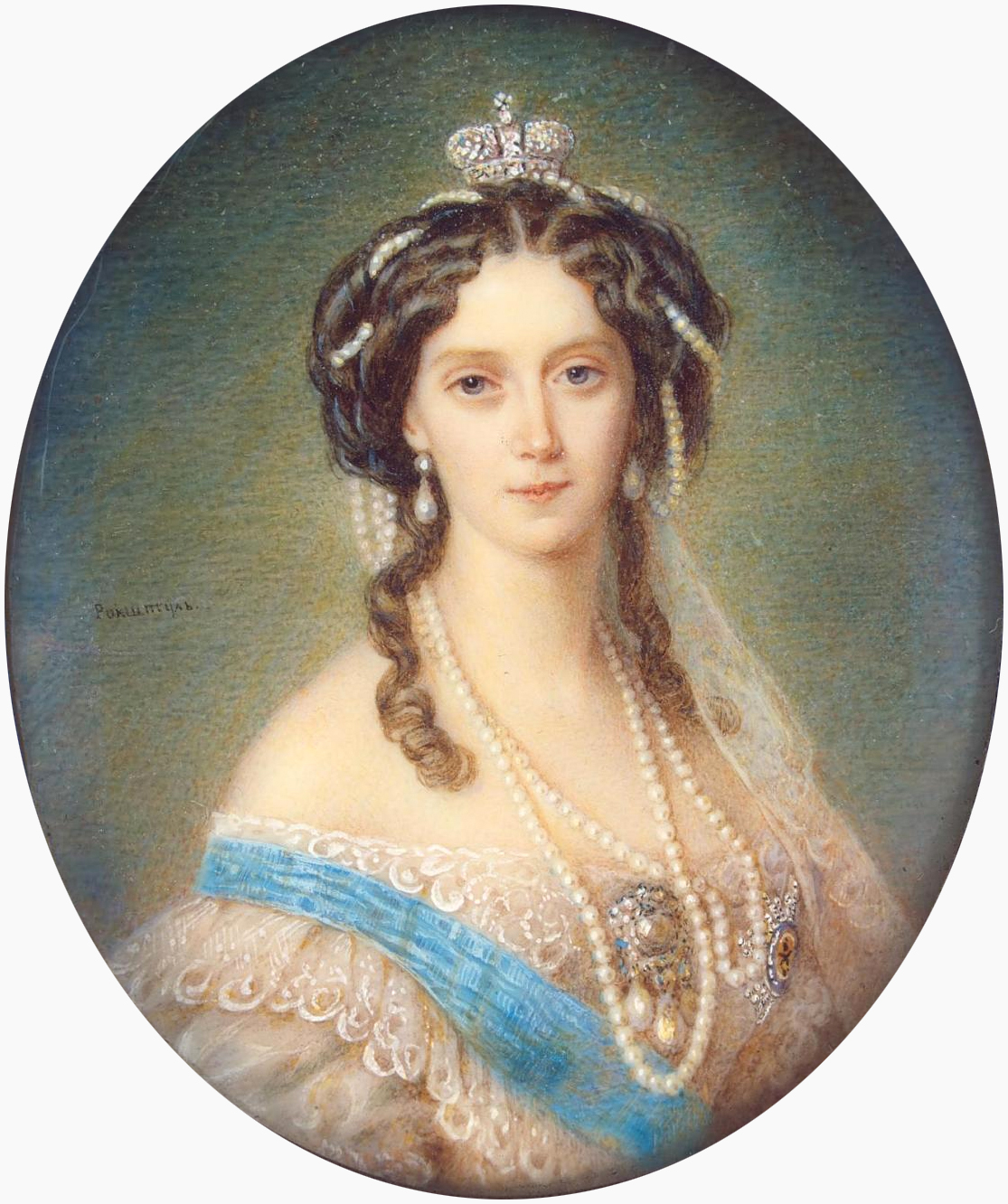 Рокштуль, Алоиз Густав Миниатюра: Портрет императрицы Марии Александровны Россия, После 1855 г. кость, акварель, гуашь 6х5,2 см ОРм-1003